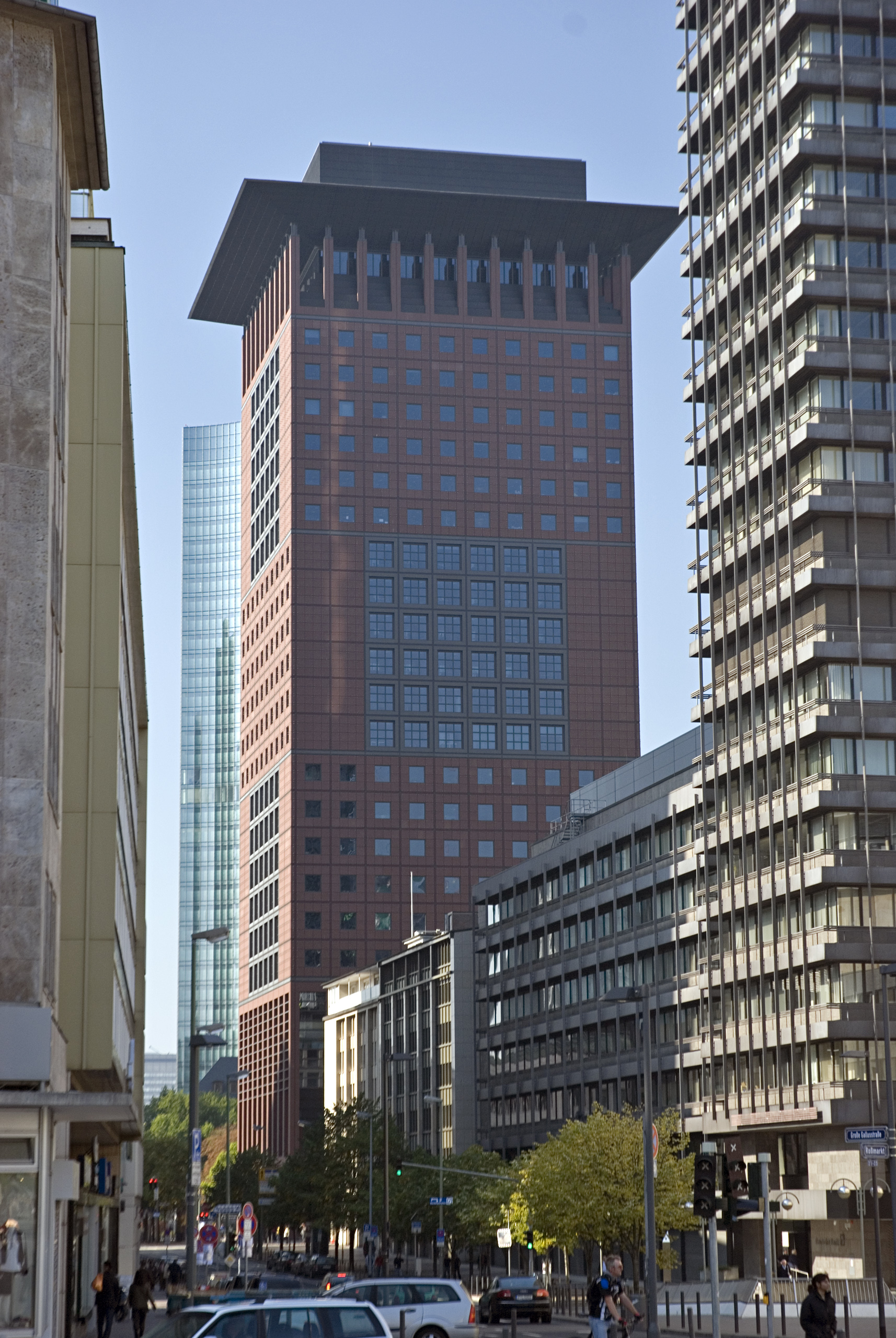 Frankfurt am Main: Blick vom Rossmarkt durch die Gallusstraße auf das Japan-Center